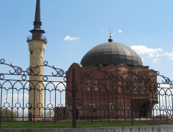 Соборная мечеть города Магнитогорска